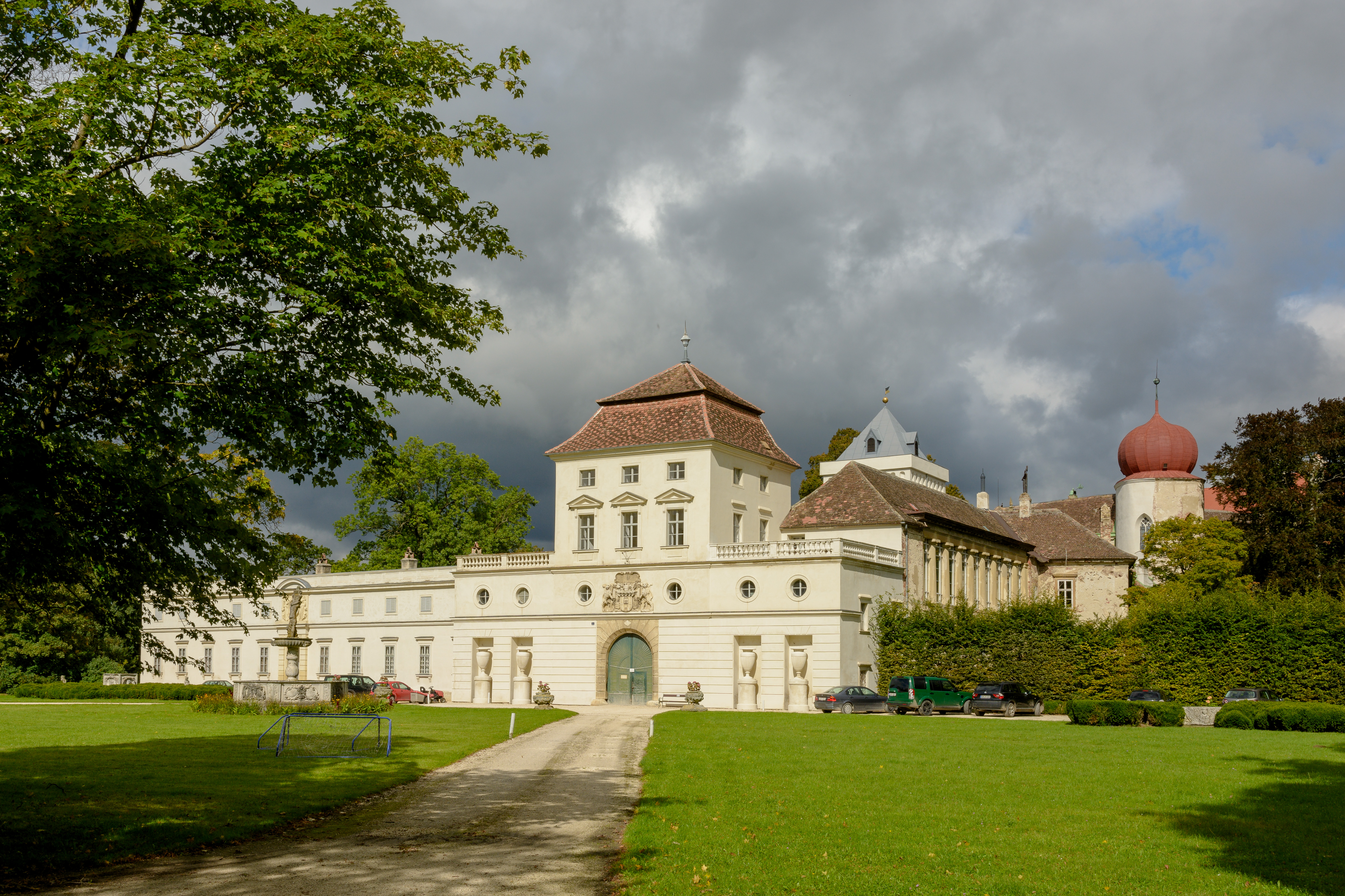 Schloss Ernstbrunn